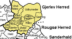 Gjerlev Herred, Randers Amt, Denmark Source: Map by Svend-Erik Christiansen